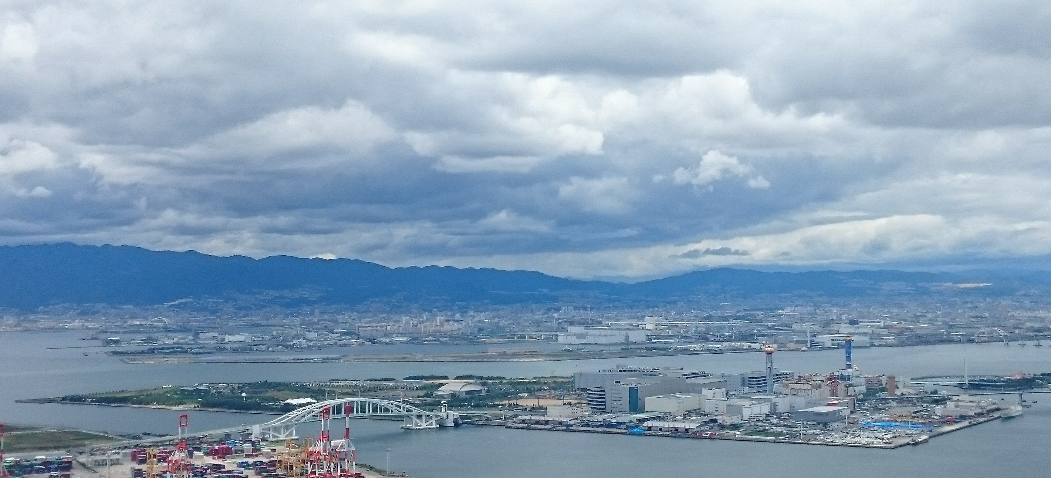 舞洲全景（大阪府咲洲庁舎より撮影）